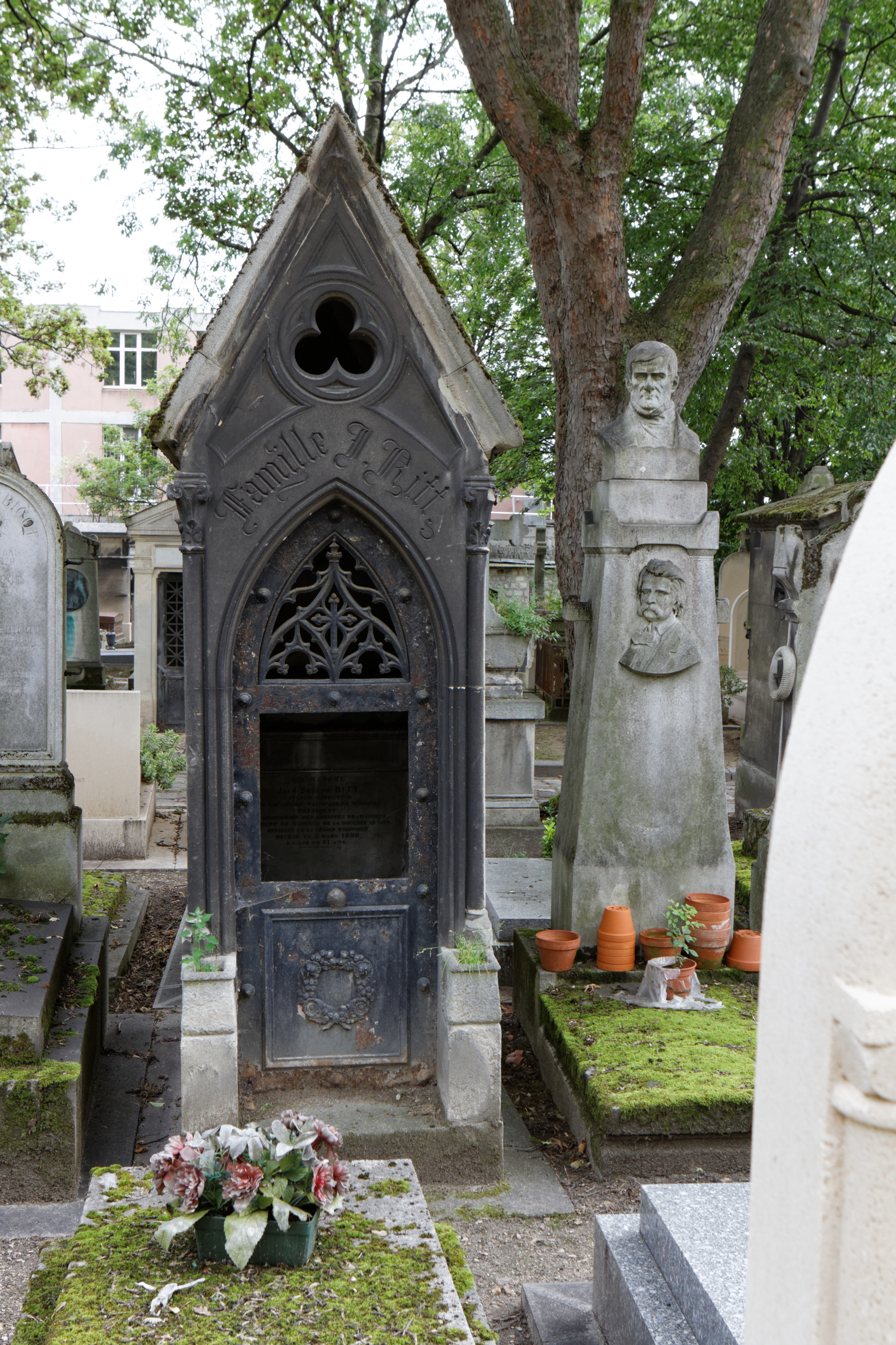 Sépulture de Jean-Eugène Ritt (1817-1898), acteur et directeur de théâtre.